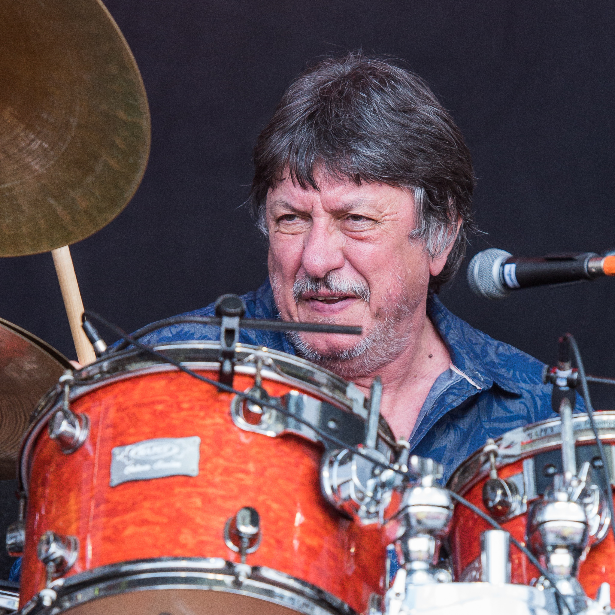 Concertbüro Franken,Festival,Konzert,Lieder am See,Livekonzert,Livemusik,Musik,Ric Lee,Richard Lee,Ten Years After